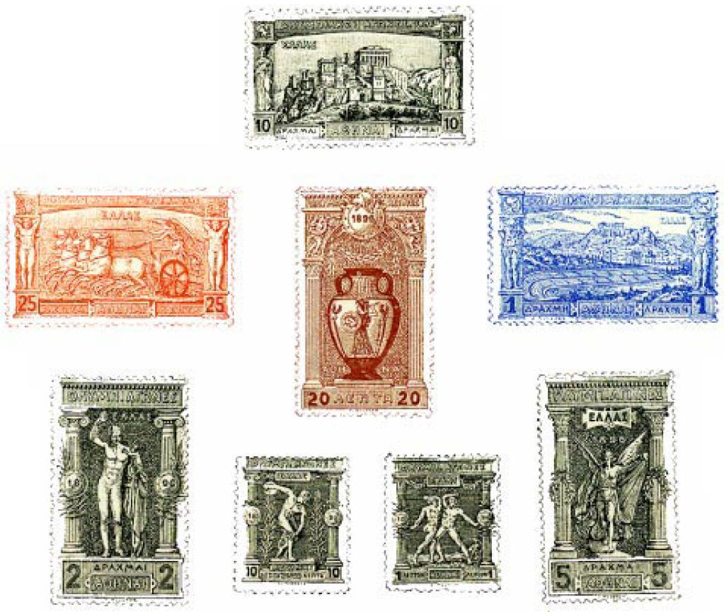 Erinnerungsbriefmarken Olympische Spiele 1896